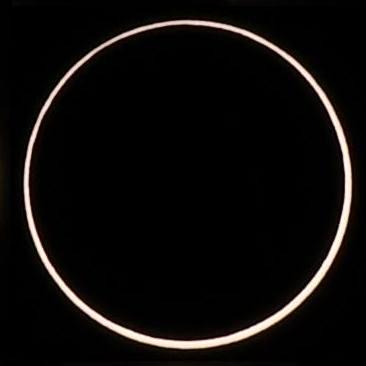 Composition des différentes phases de l'éclipse annulaire du 1er septembre 2016 depuis l'Etang Salé (Ile de la Réunion)